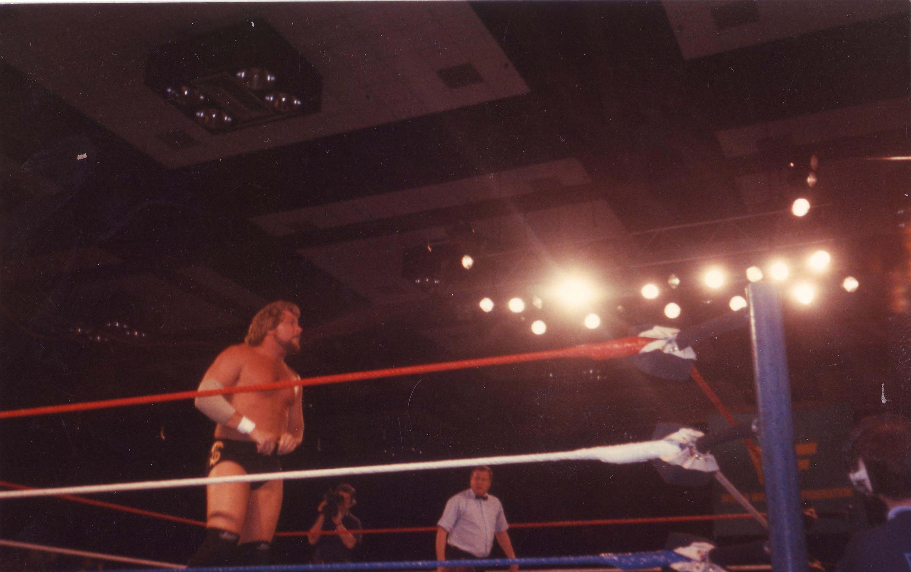 Le catcheur Ted DiBiase Sr. sur le ring (probablement dans les années 1980)